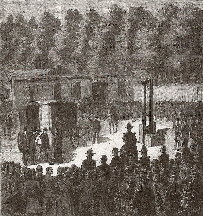 Bordeaux - exécution de Aussier - Place du Repos 1891